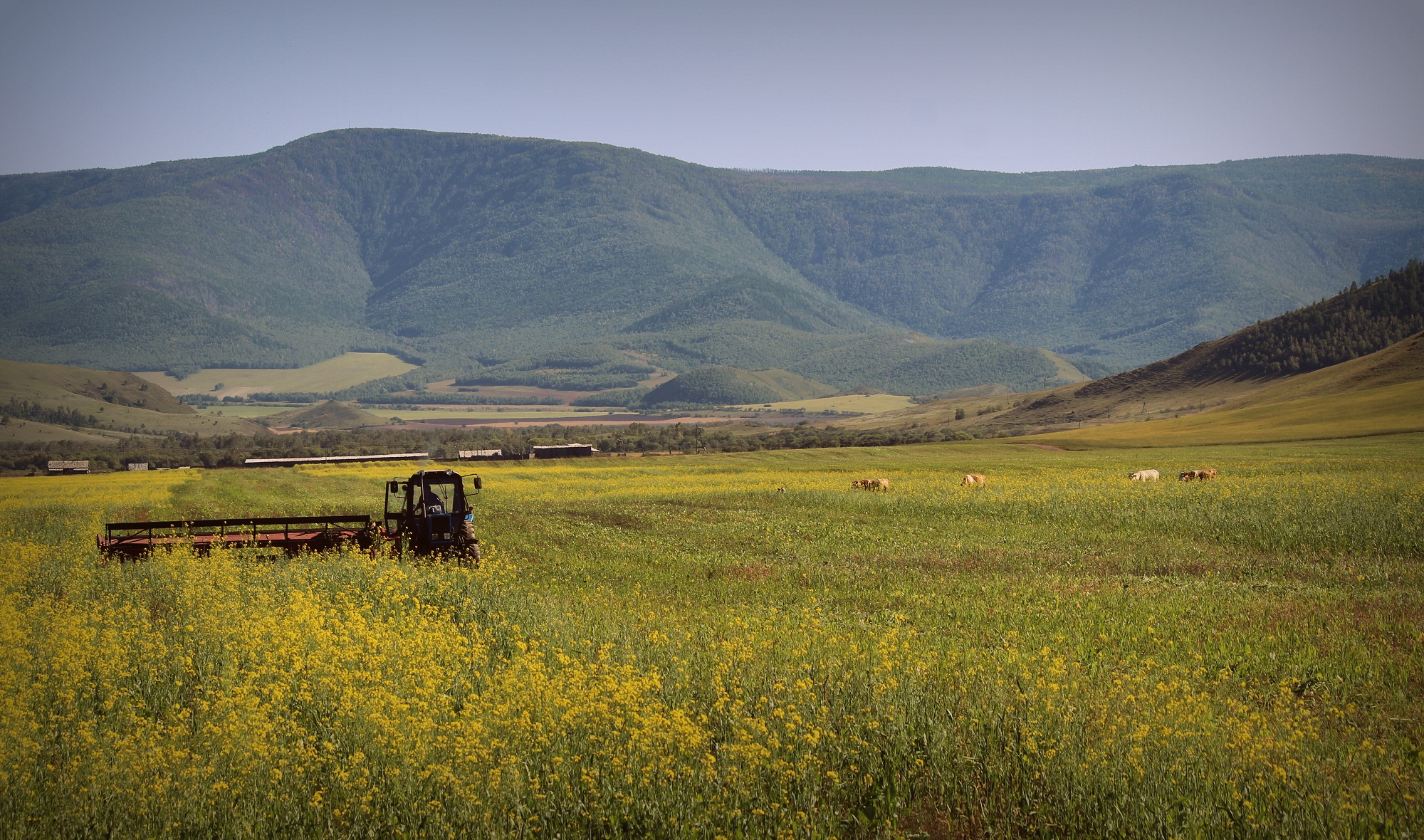 Уборка рапса в Булыке. Джидинский район, Бурятия